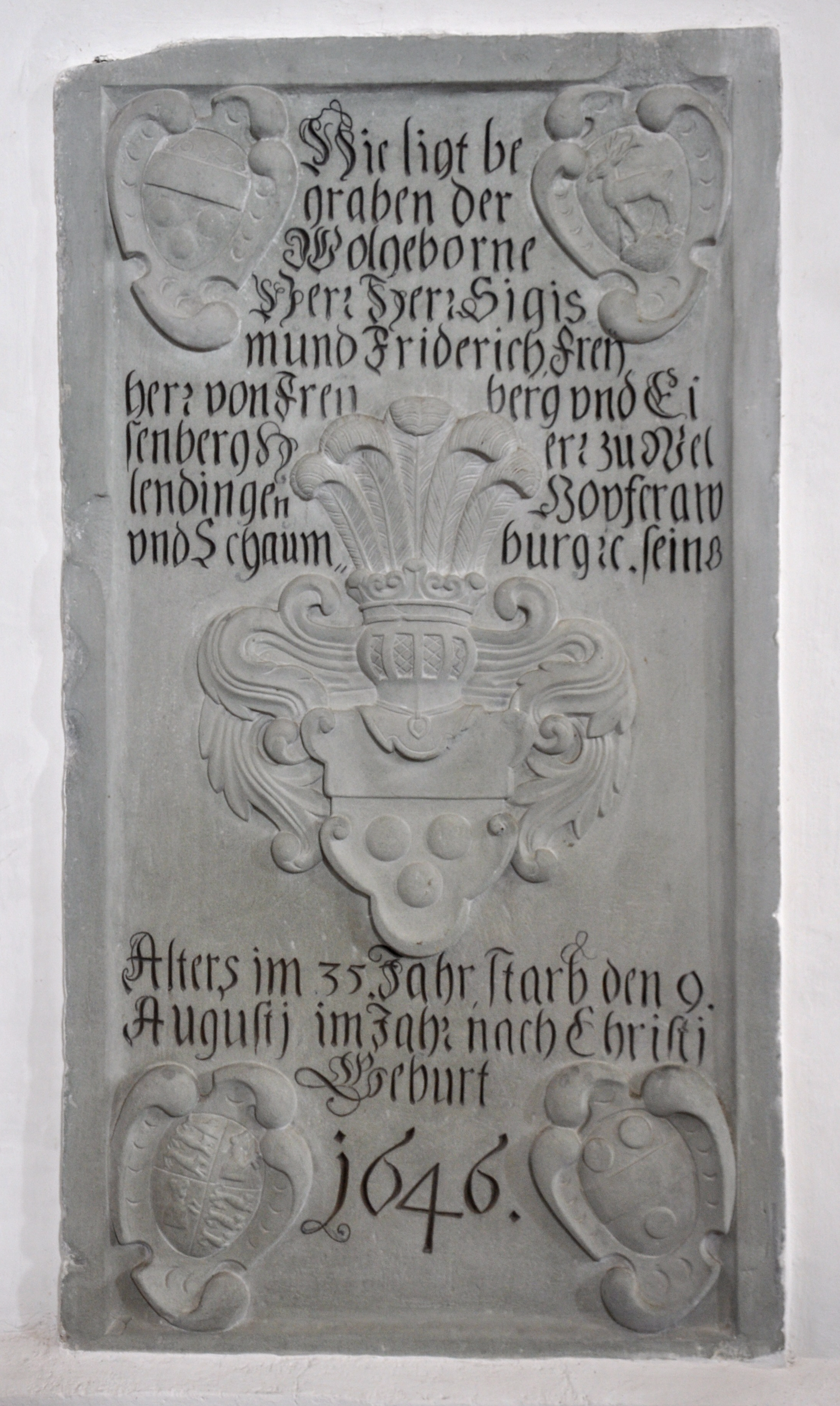 Pfärrich (Gemeinde Amtzell), Pfarr- und Wallfahrtskirche Mariä Geburt Epitaph Sigismund Friedrich von Freyberg-Eisenburg († 1646) mit Ahnenprobe Gesamtansicht